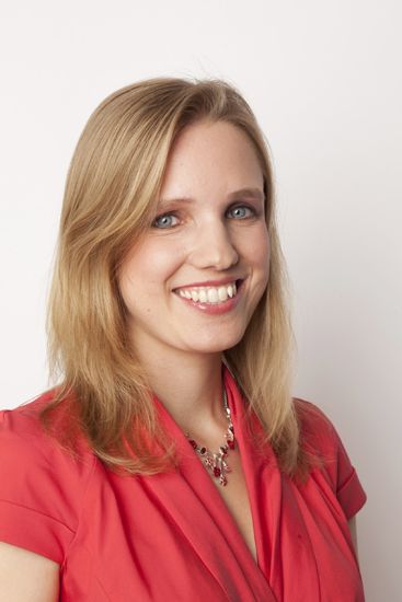 Ing. Lenka Andrýsová, poslankyně za VV.